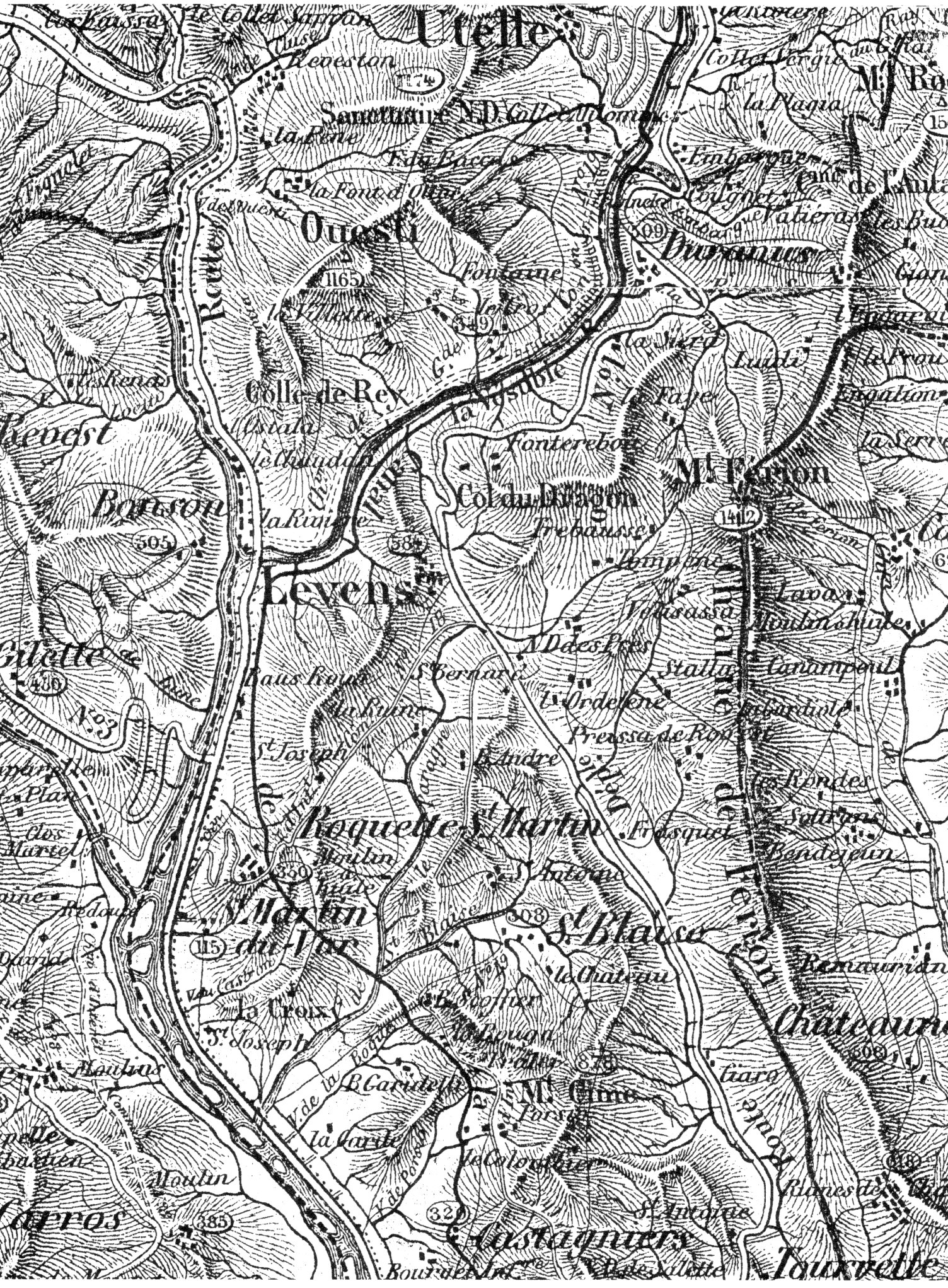 carte de Levens vers 1885 (Alpes-maritimes, France). A cette époque, le canal de la Vésubie apportant l'eau à Nice est déjà construit, mais la route carrossable dans les gorges de la Vésubie est en cours de construction.